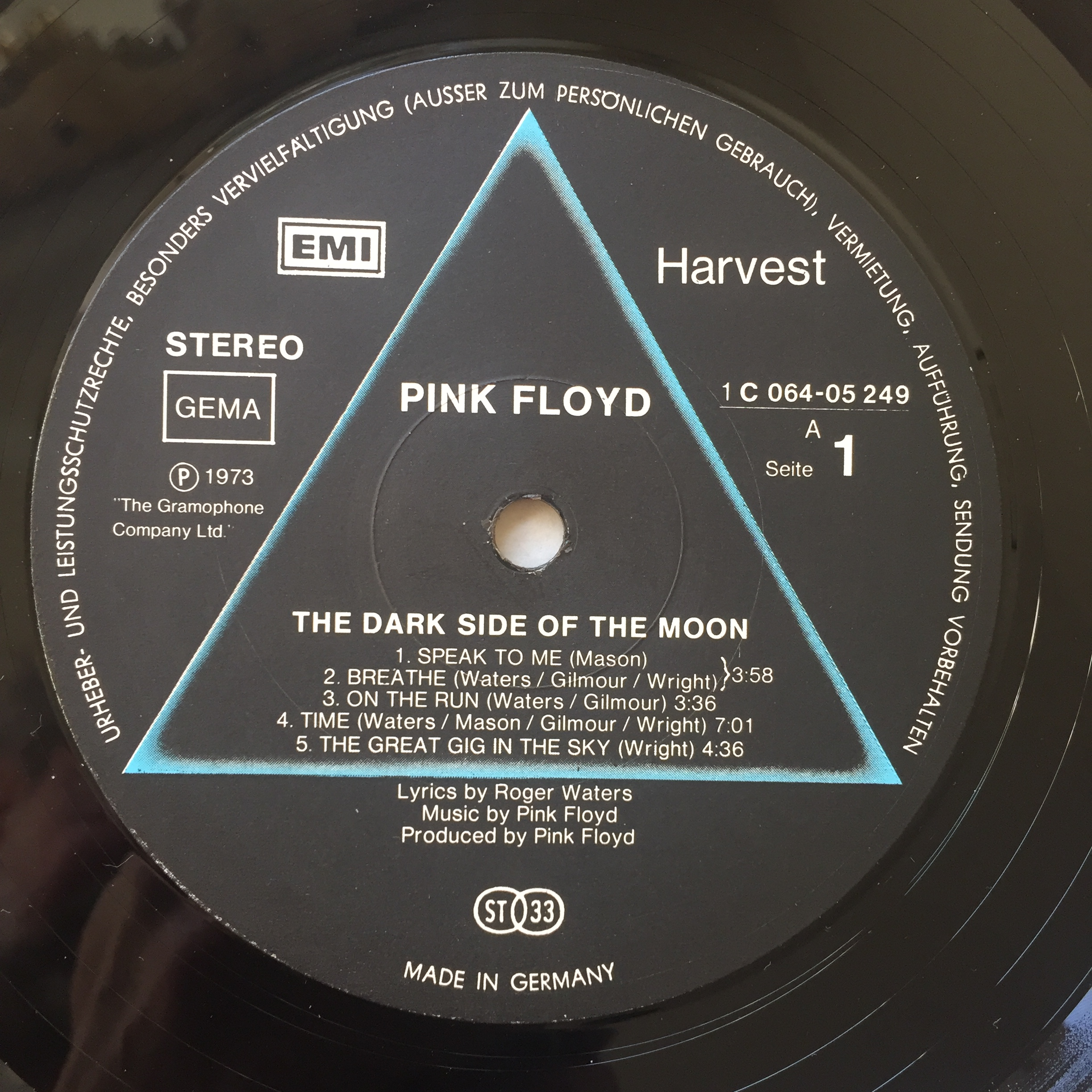 Label LP "The Dark Side Of The Moon" - Pink Floyd